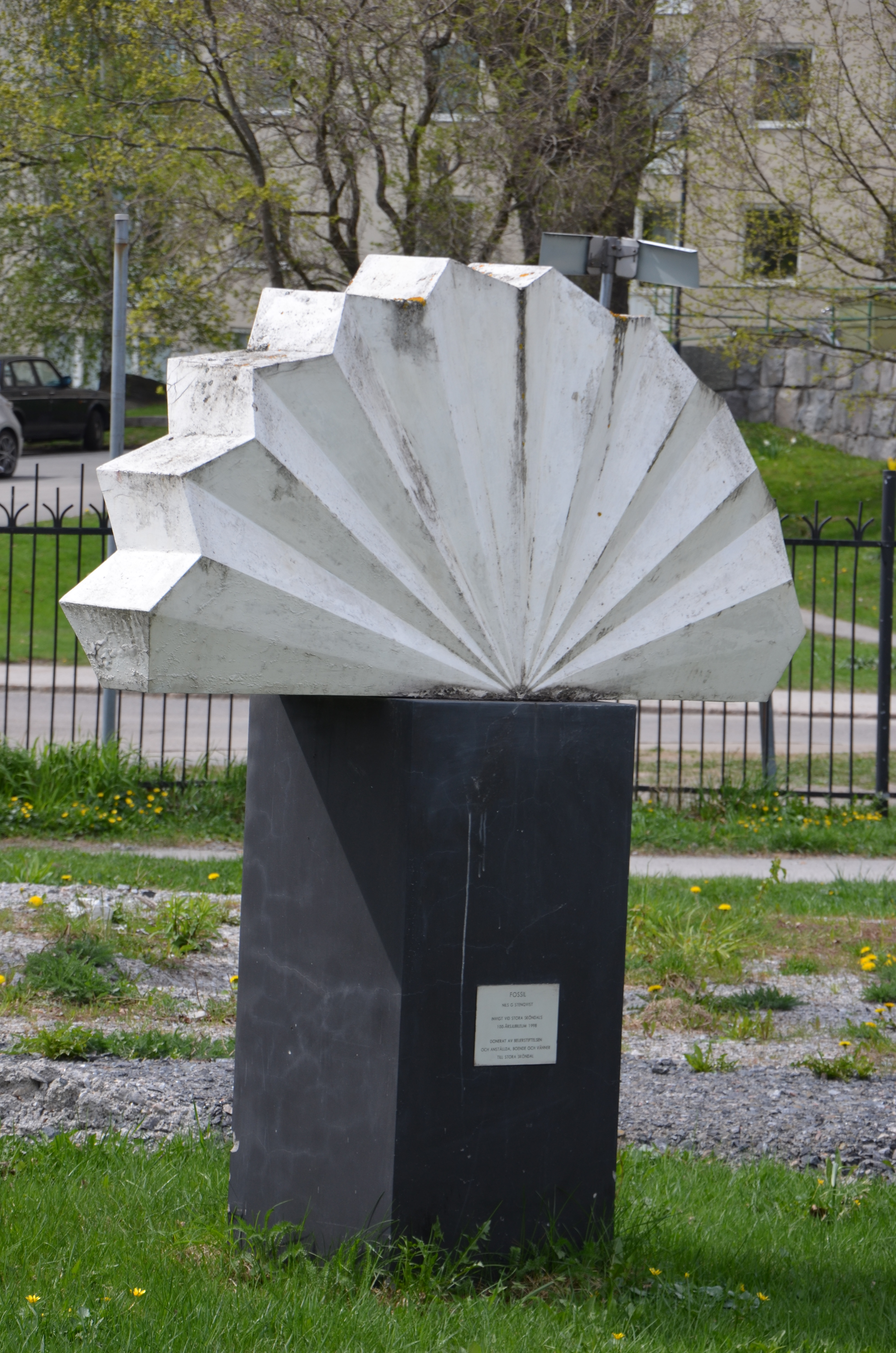 Nils G Stenqvist's Fossil, Nils Lövgrens väg, Sköndal, Stockholm